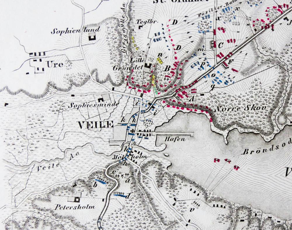 Karte auf einer Mappe